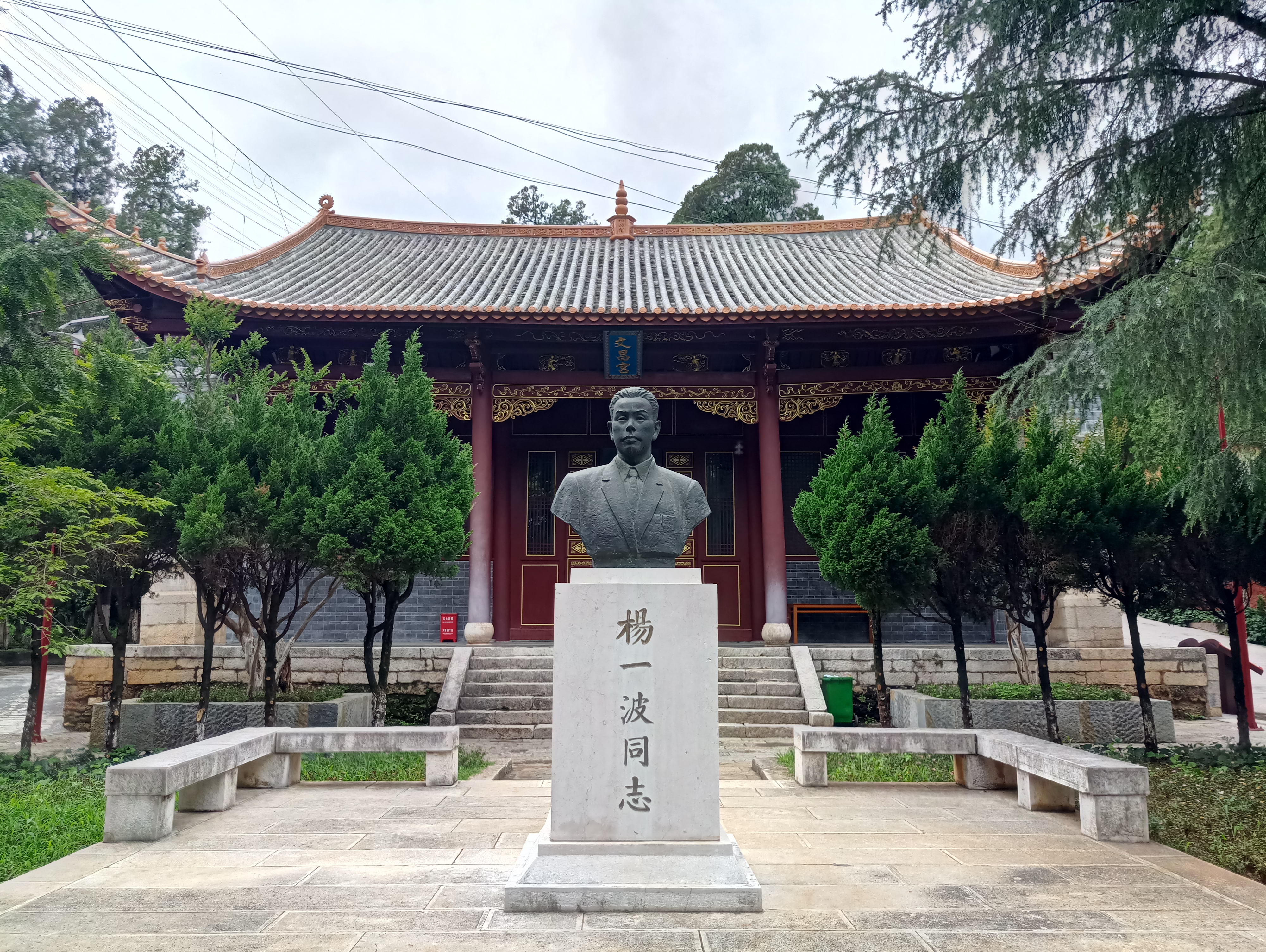 路南州文庙文昌宫与杨一波雕像